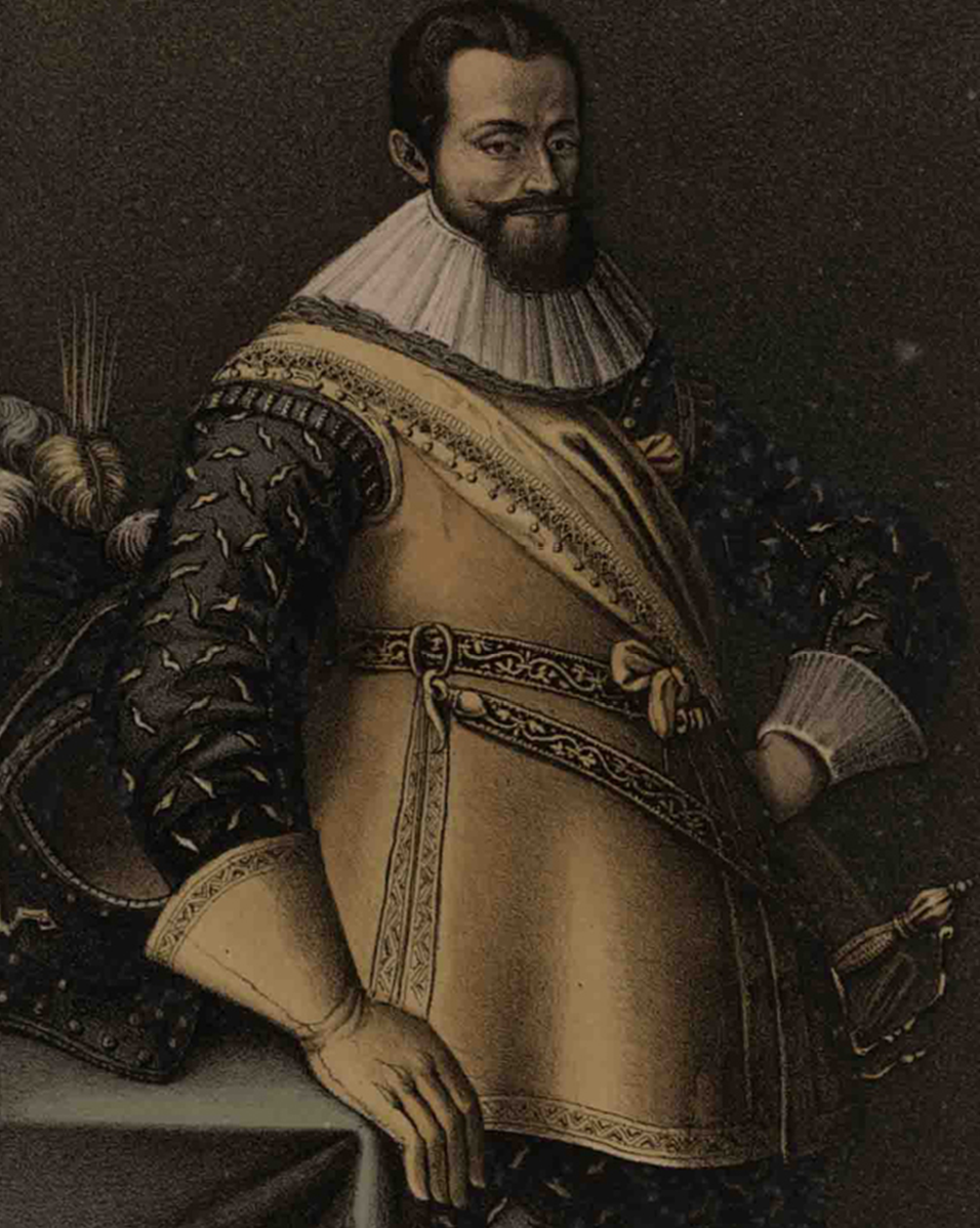 Martin Schenk von Nideggen